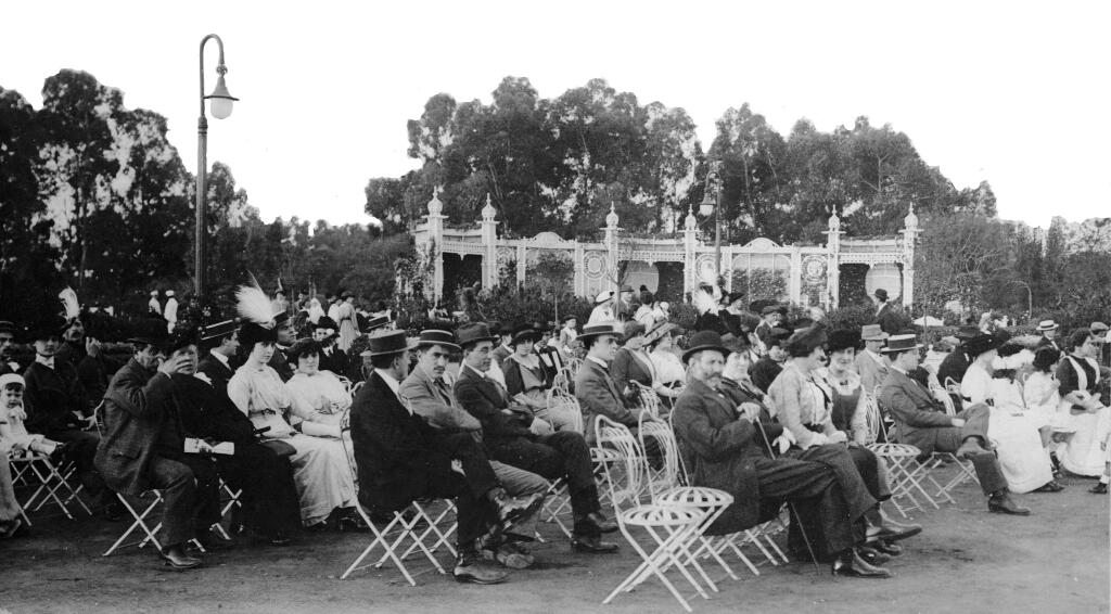 Concierto en el rosedal de Palermo, Buenos Aires 1914. Inventario 10183. General Archive of the Nation (Argentina) Native nameArchivo General de la Nación ArgentinaLocationBuenos Aires, ArgentinaEstablished28 August 1821Website control : Q2860529 This file, was provided to Wikimedia Commons thanks to an agreement between the General Archive of the Nation of Argentina and Wikimedia Argentina.